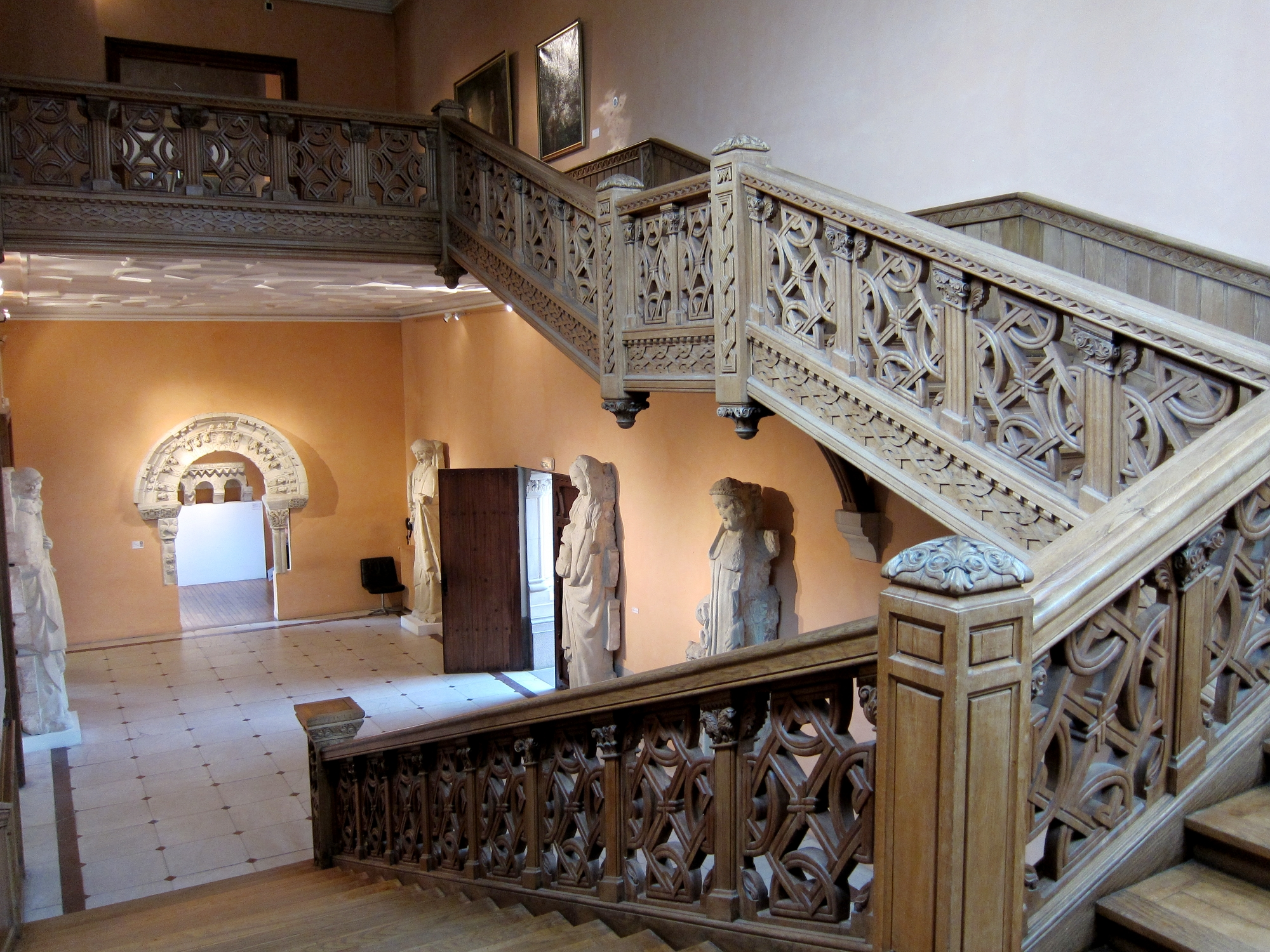 L'escalier du musée Dobrée de Nantes.